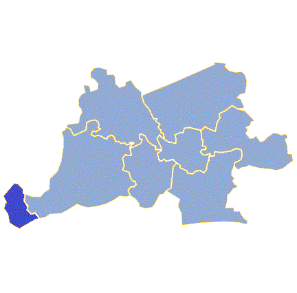 Powiat gorzowski - Gmina Kosztrzyn nad Odrą